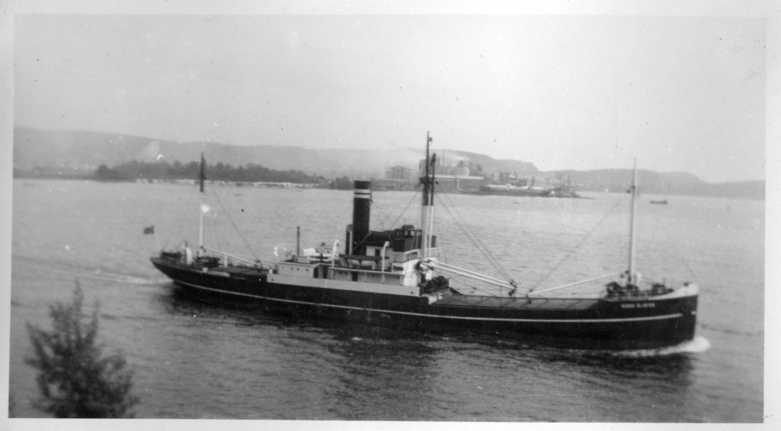 Bildet er hentet fra Arkivverket. Sønnenfjeldske D.S Oslo, 1300 TON.DW. I tysk tjeneste. V/Torsberg Porsgrun Arkivinstitusjon : Statsarkivet i Kongsberg Arkivnavn : Telemark politikammer Sted : Norge, Telemark, Porsgrunn, Torsberg Emneord: Skip, Hav, Båt Avbildet